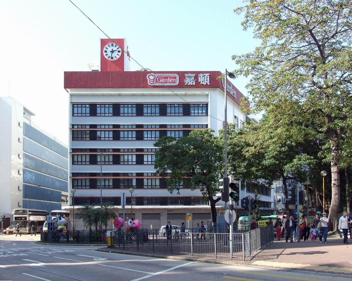 嘉頓中心頂樓的鐘樓